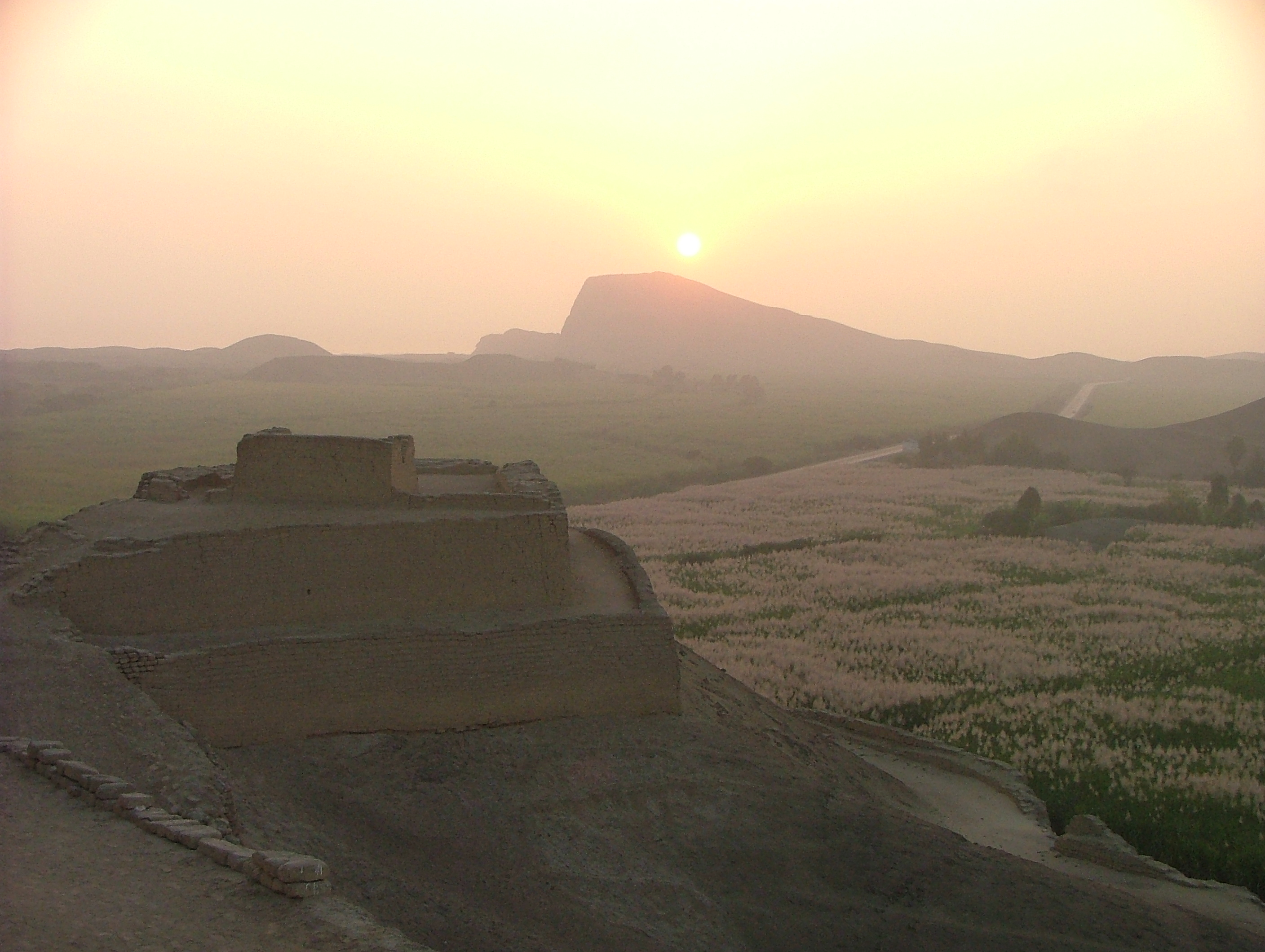 Sunset overlooking the observatory and down to the Pan American Highway, Paramonga, Peru